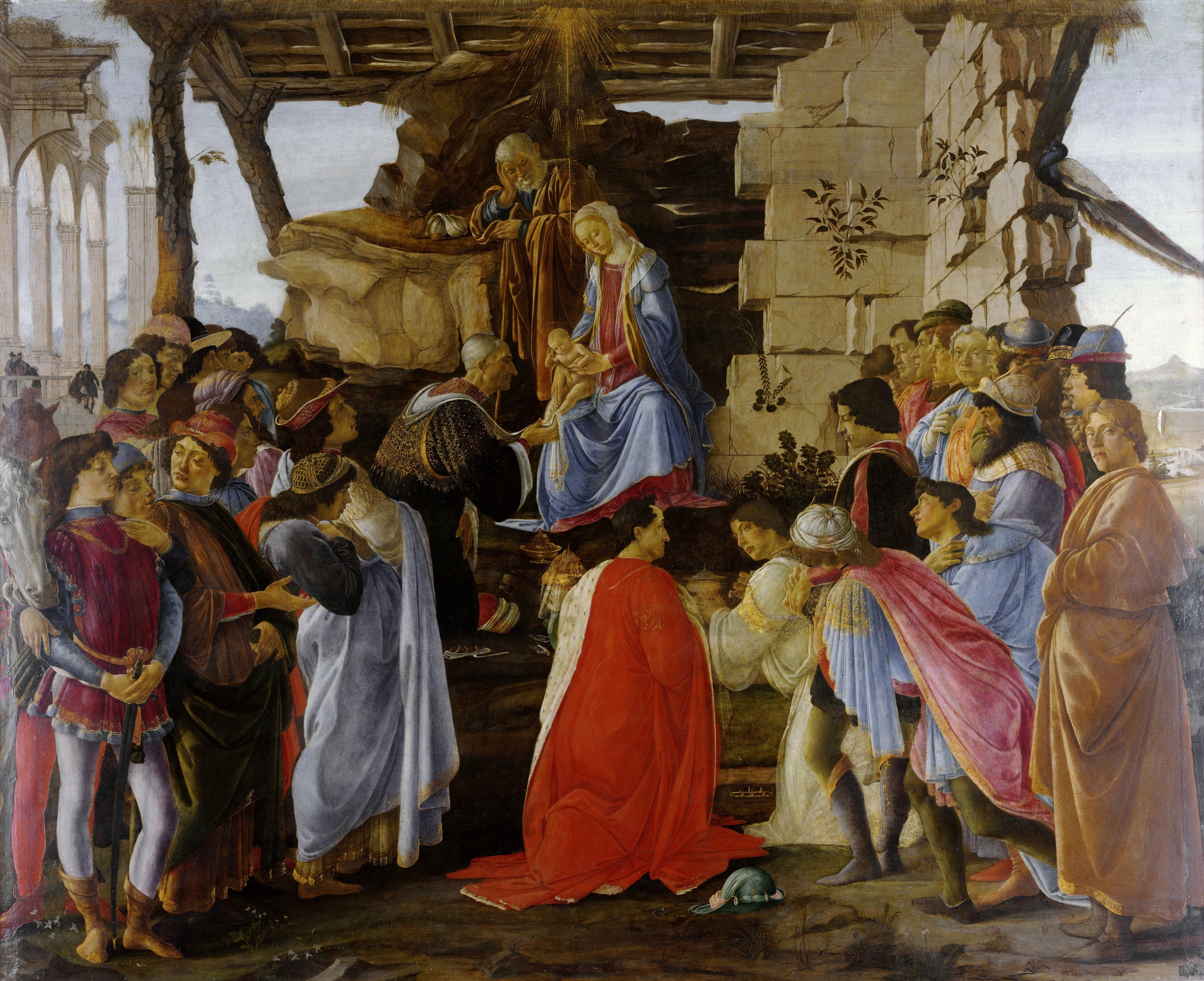 Darstellung der Mitglieder der Medici-Familie als Könige: Cosimo de' Medici (kniend), Piero de' Medici und Giovanni (Rückenfiguren im Mittelpunkt) und Angehörige des Medici-Hofes